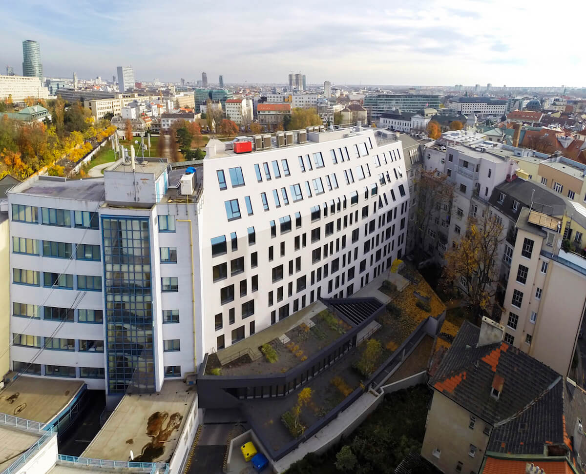 BGS nadhľad